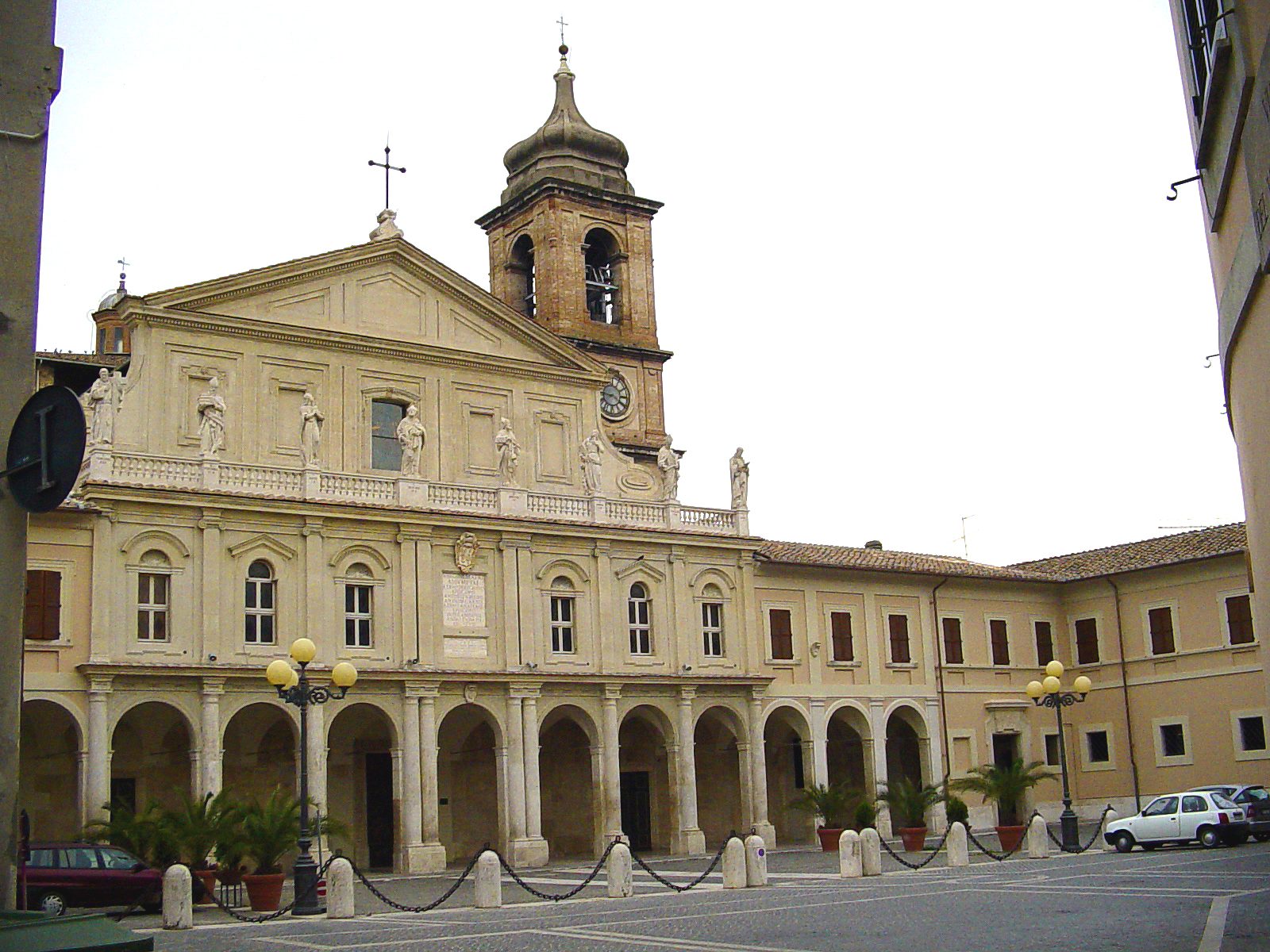 Il duomo della città di Terni